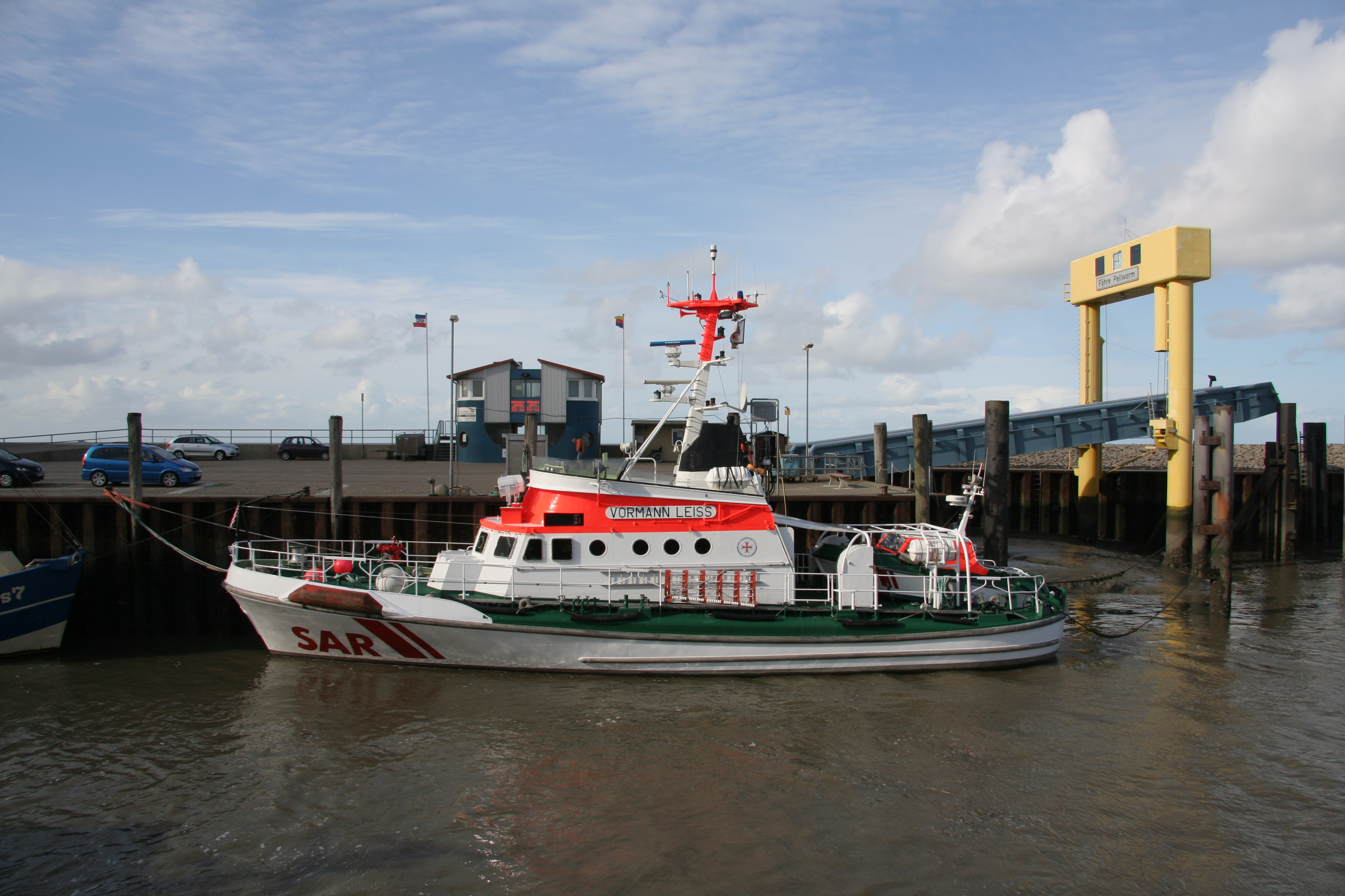 Seenotkreuzer "Vormann Leiss" der Deutschen Gesellschaft zur Rettung Schiffbrüchiger (DGzRS) im Hafen von Strucklahnungshörn